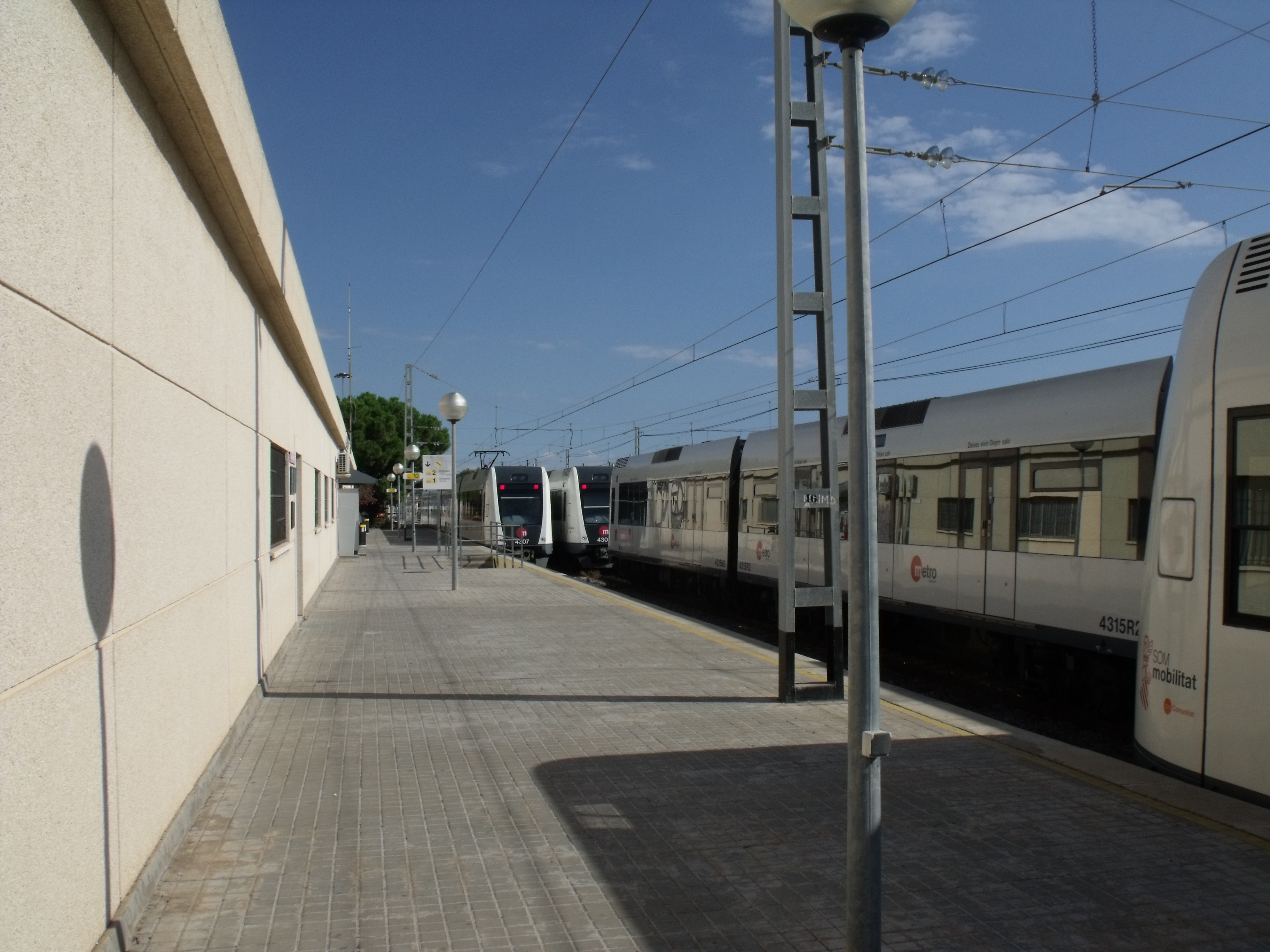 Estació de València Sud.